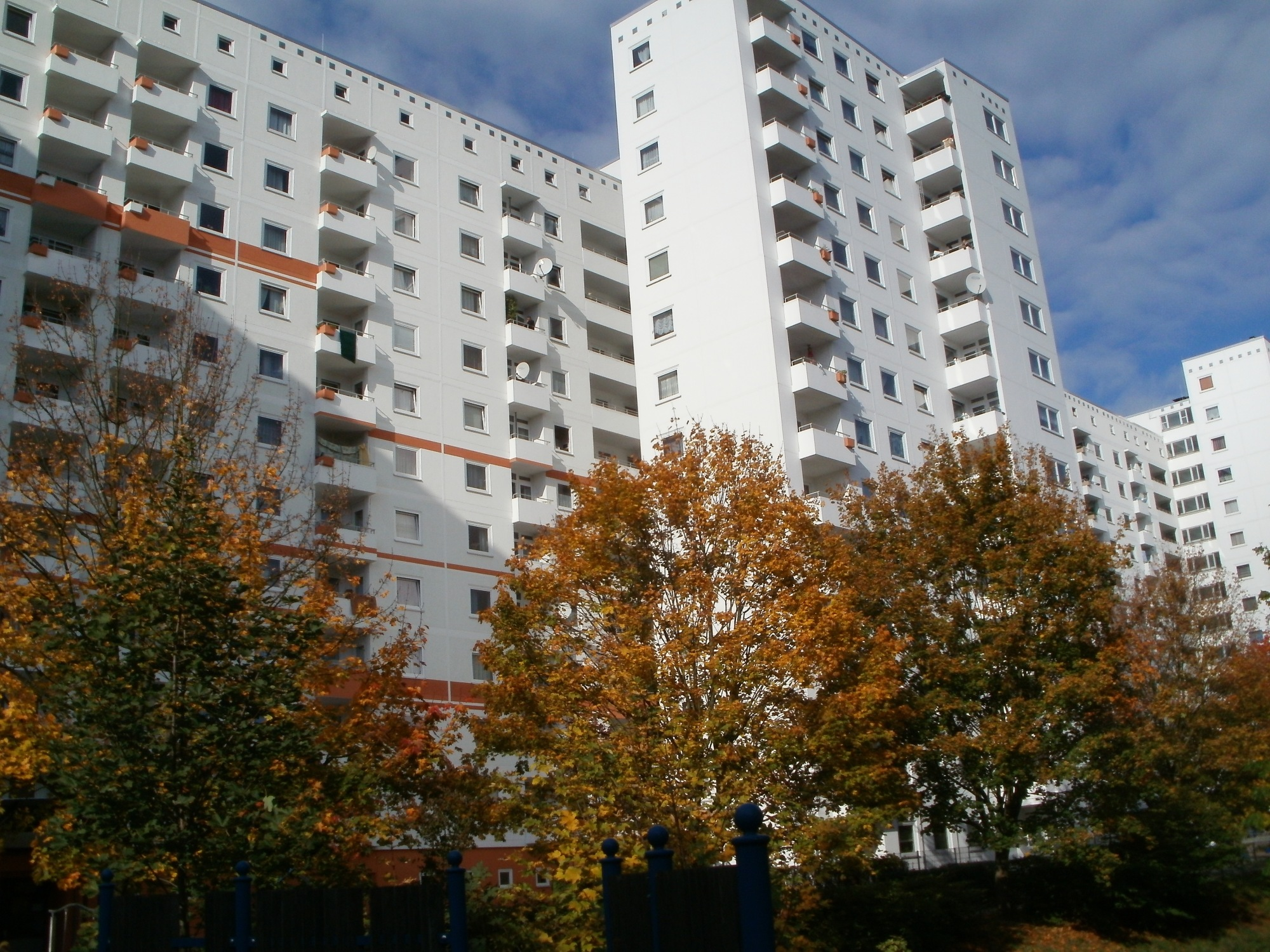 Das Bild zeigt Hochhäuser der Siedlung Kirchdorf-Süd in Hamburg-Wilhelmsburg.